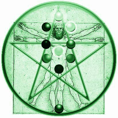 Livets tre.